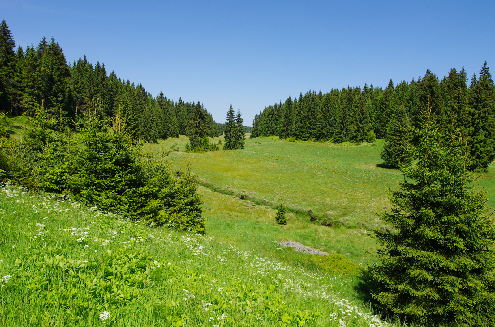 Národní přírodní rezervace Rolavská vrchoviště, v místě pod bývalou Červenou hájenkou, okres Sokolov